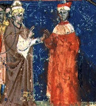 Alexandr III. a Fridrich Barbarossa